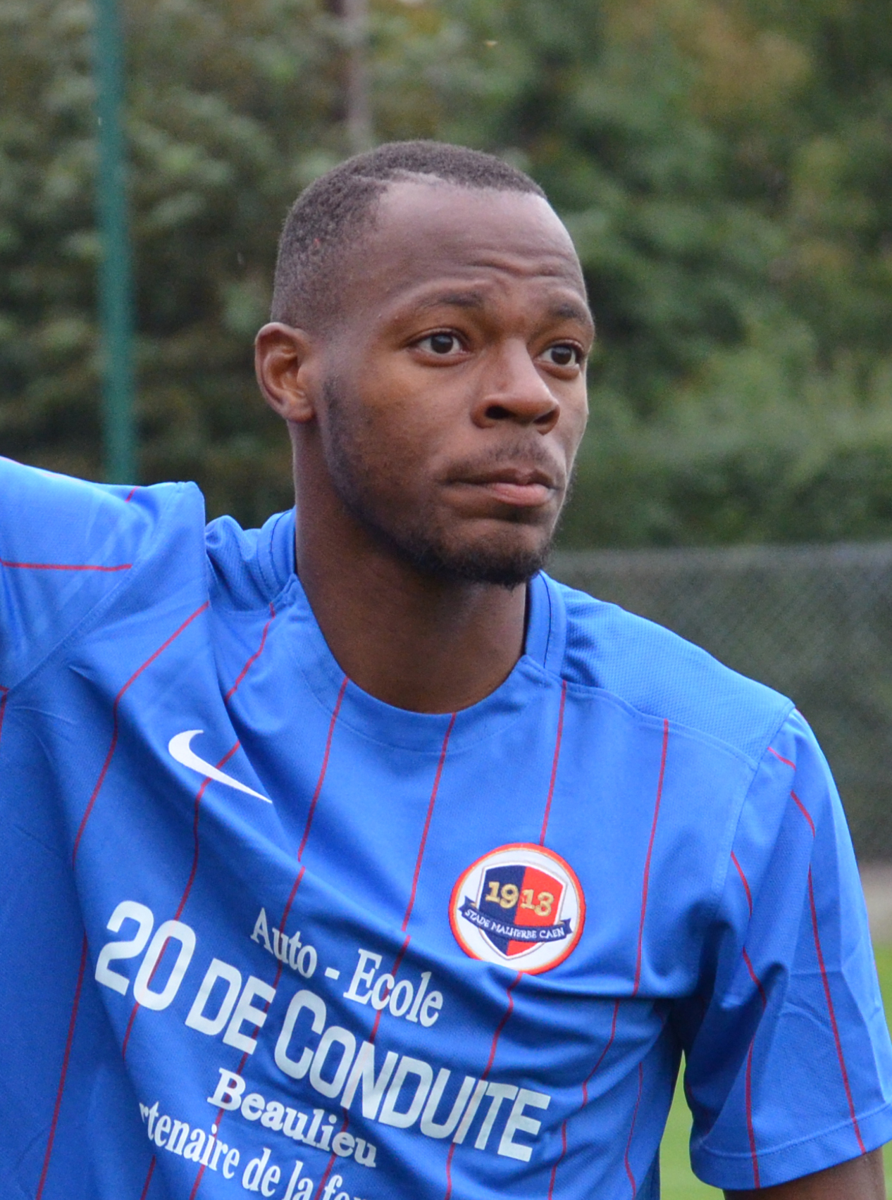 Photographie prise lors d'un match amical opposant les équipes réserves du Stade Malherbe de Caen et du Stade rennais sur l'un des terrains annexes du stade de Venoix le 13 septembre 2015. Ici, Hervé Bazile.